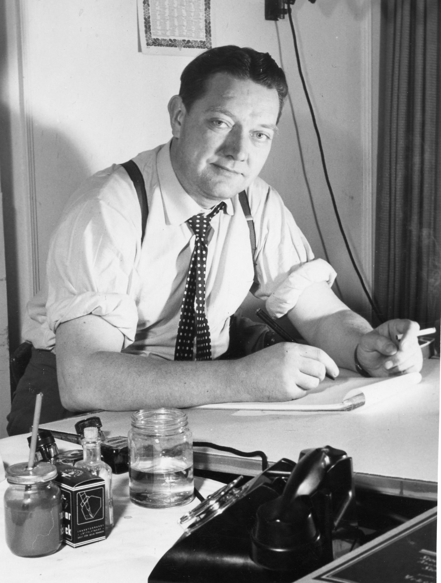 Bertil "Ason" Andersson i Solna dec 1950